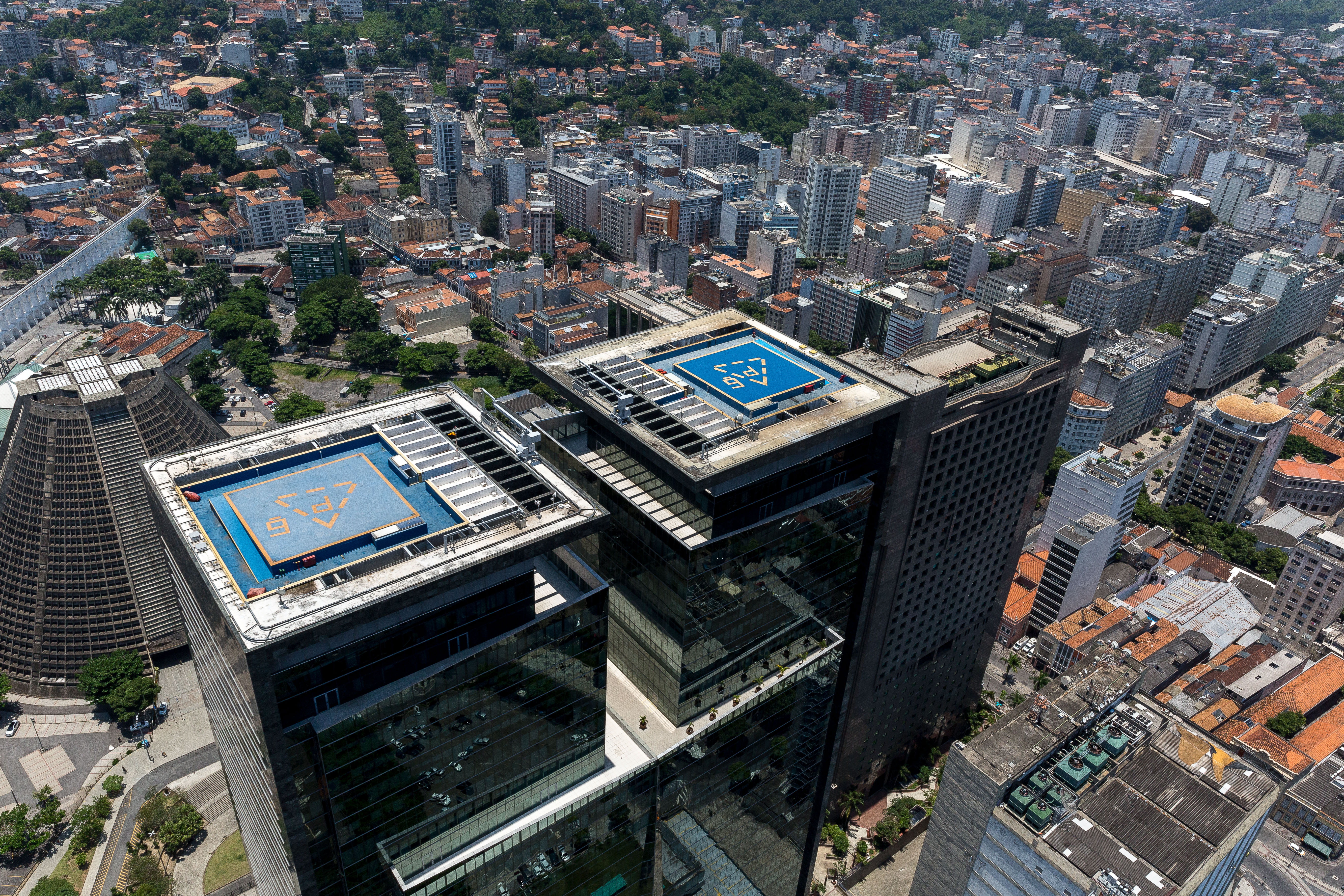 Vista aérea das torres da Petrobras, no centro da cidade do Rio de Janeiro.